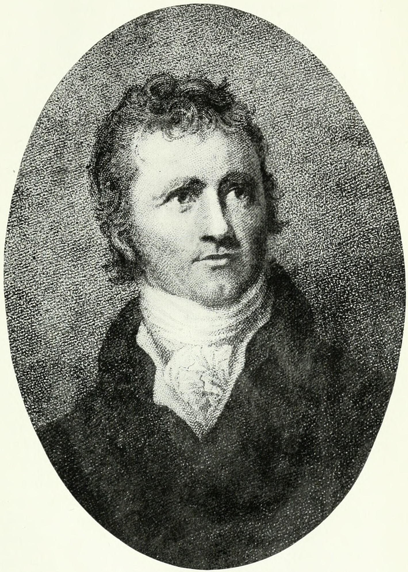 Sir Alexander Mackenzie